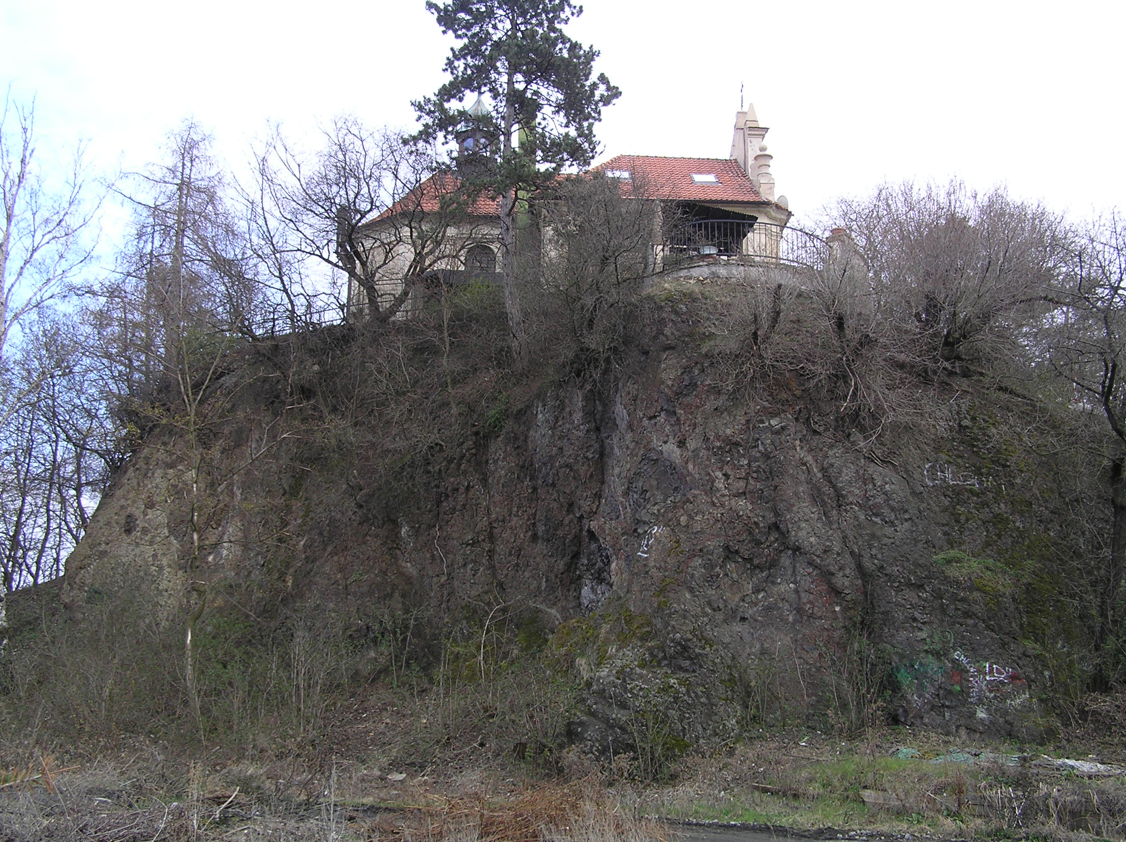 Kaple svatého Jana Nepomuckého, vrch Chloumek, Chloumek, Chloumek (Mělník).